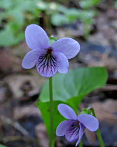 Purva vijolīte